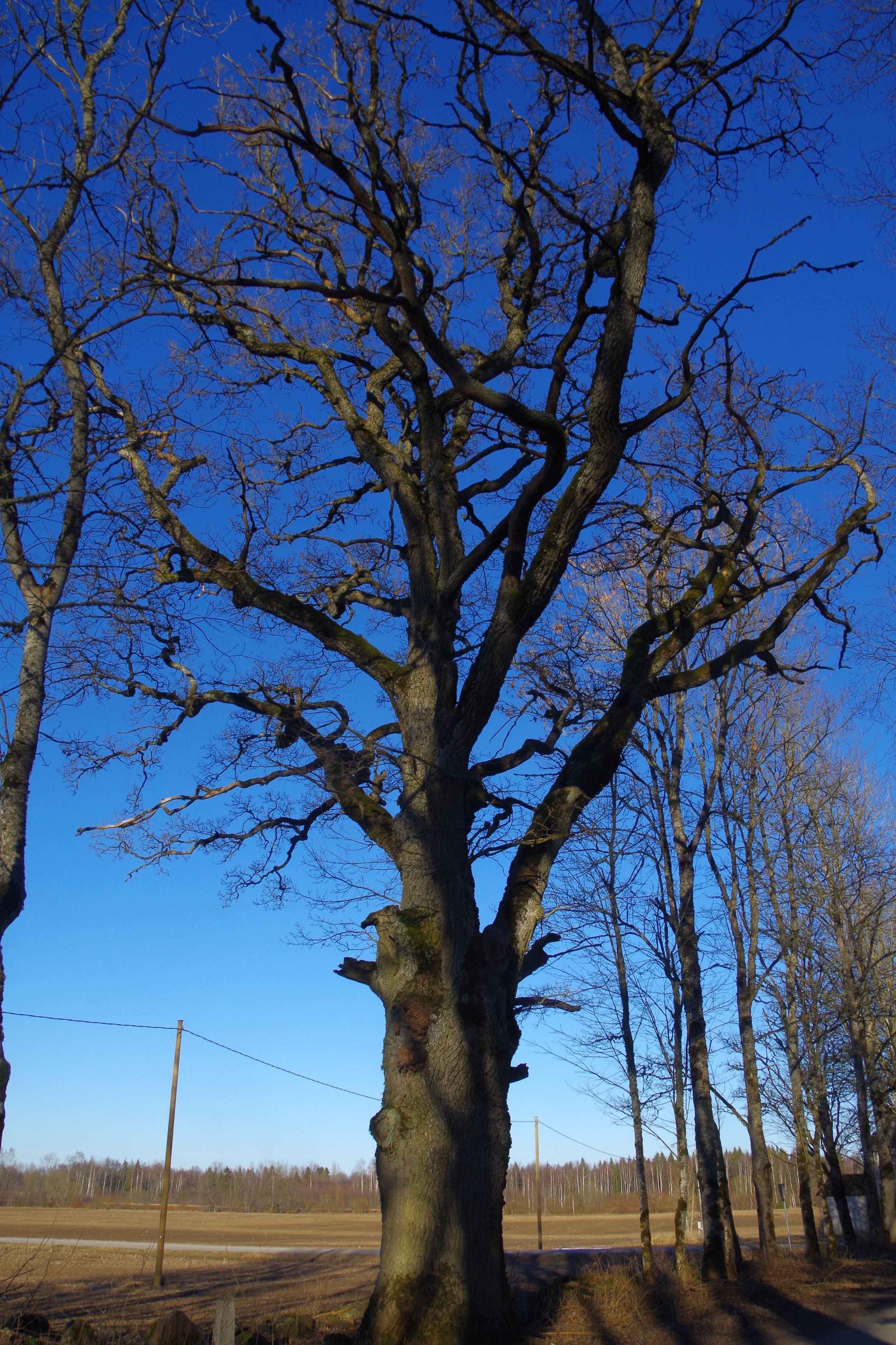 Ohekatku tamm